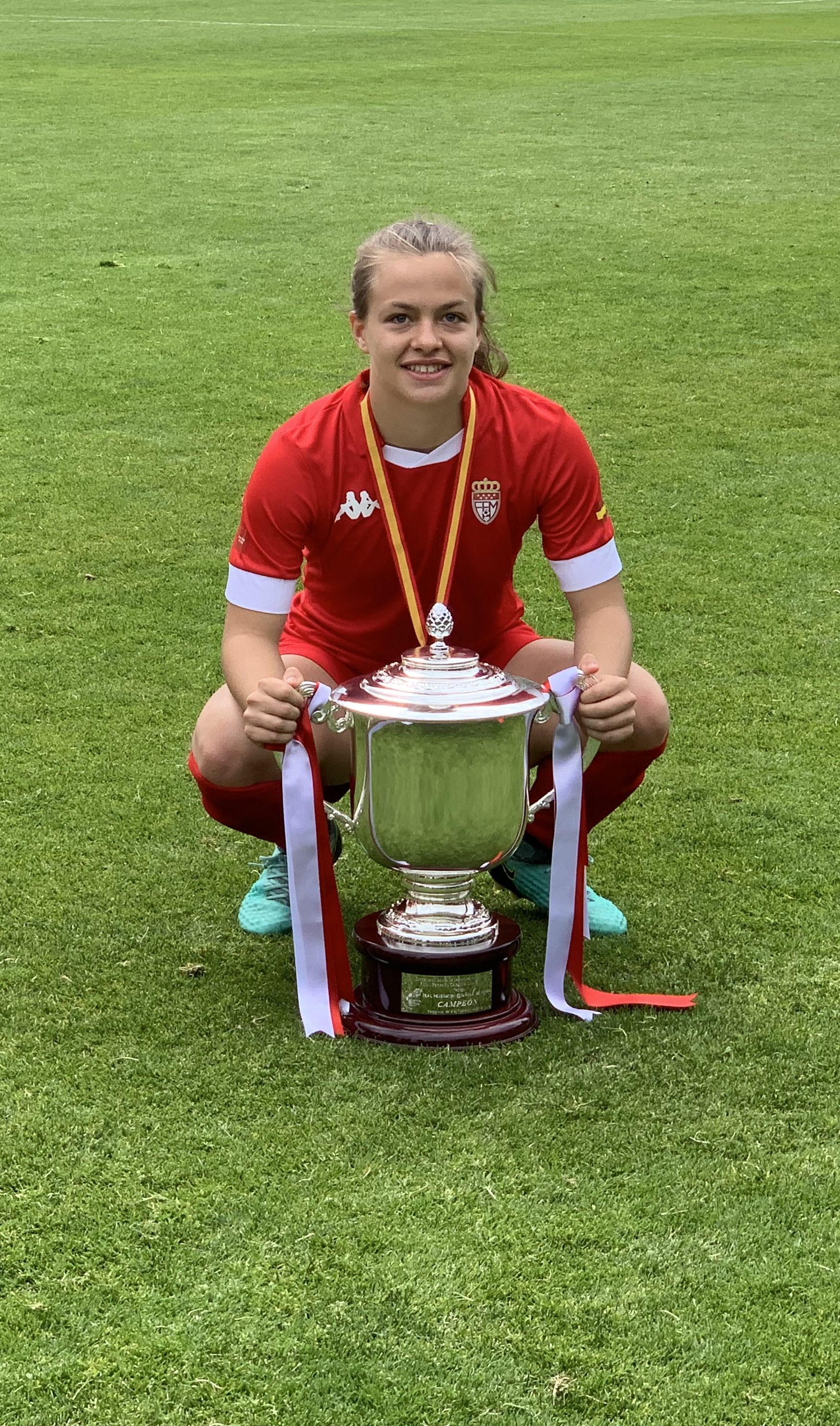 María Portolés con la copa del Campeonato de España sub 17 de Fútbol Femenino 2018/2019